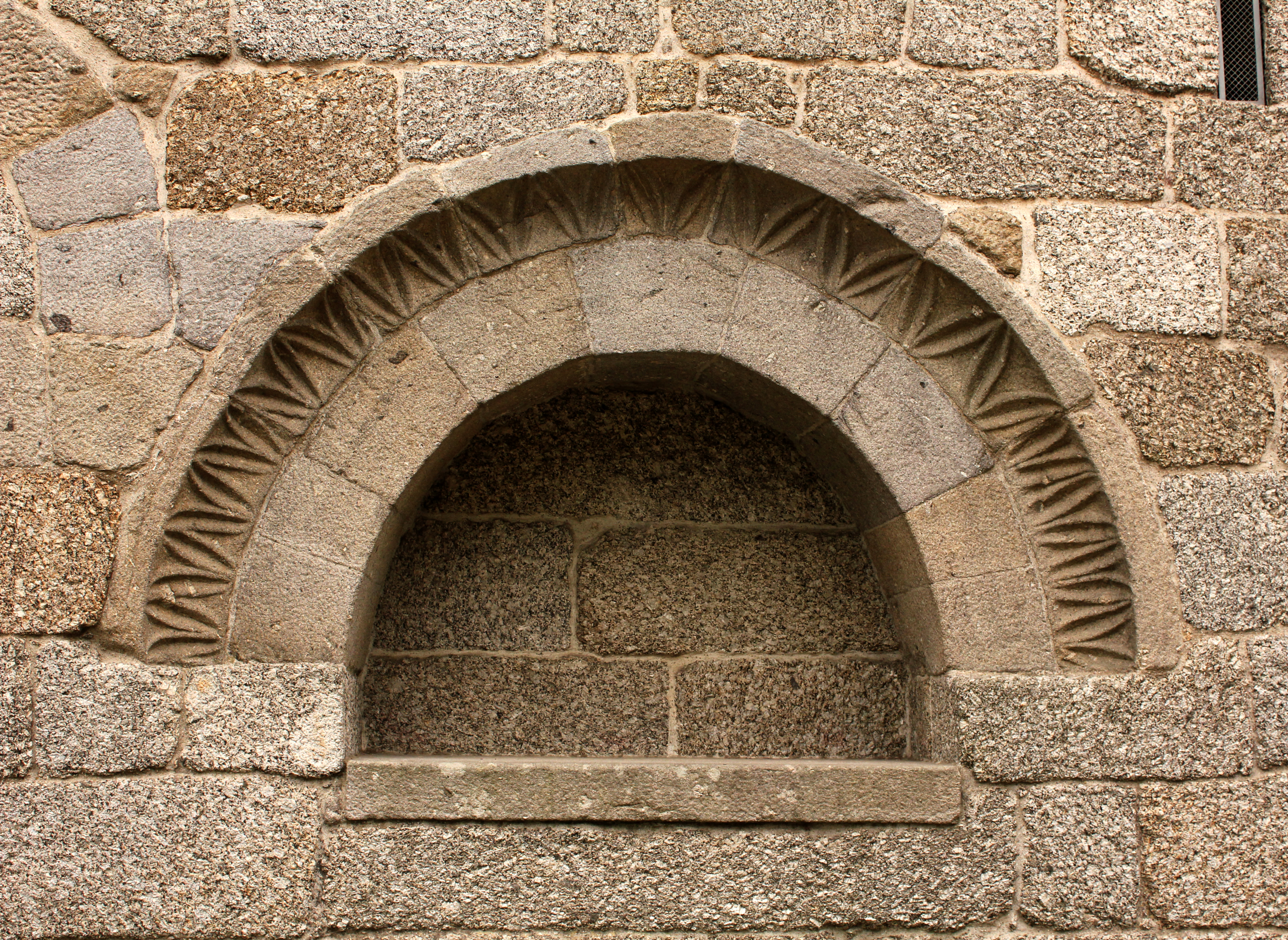 Igreja de São Miguel do Castelo